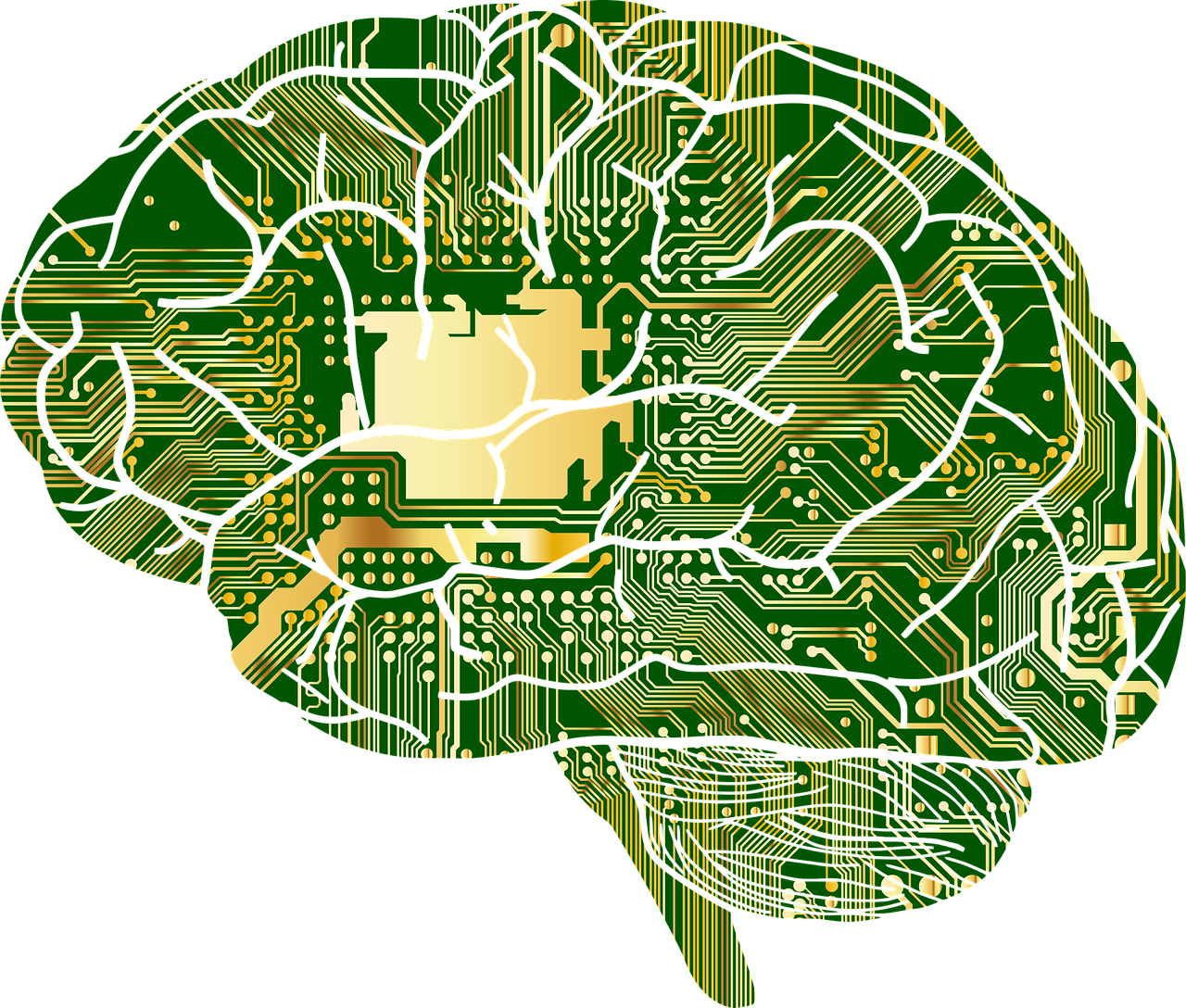 Кибермозг